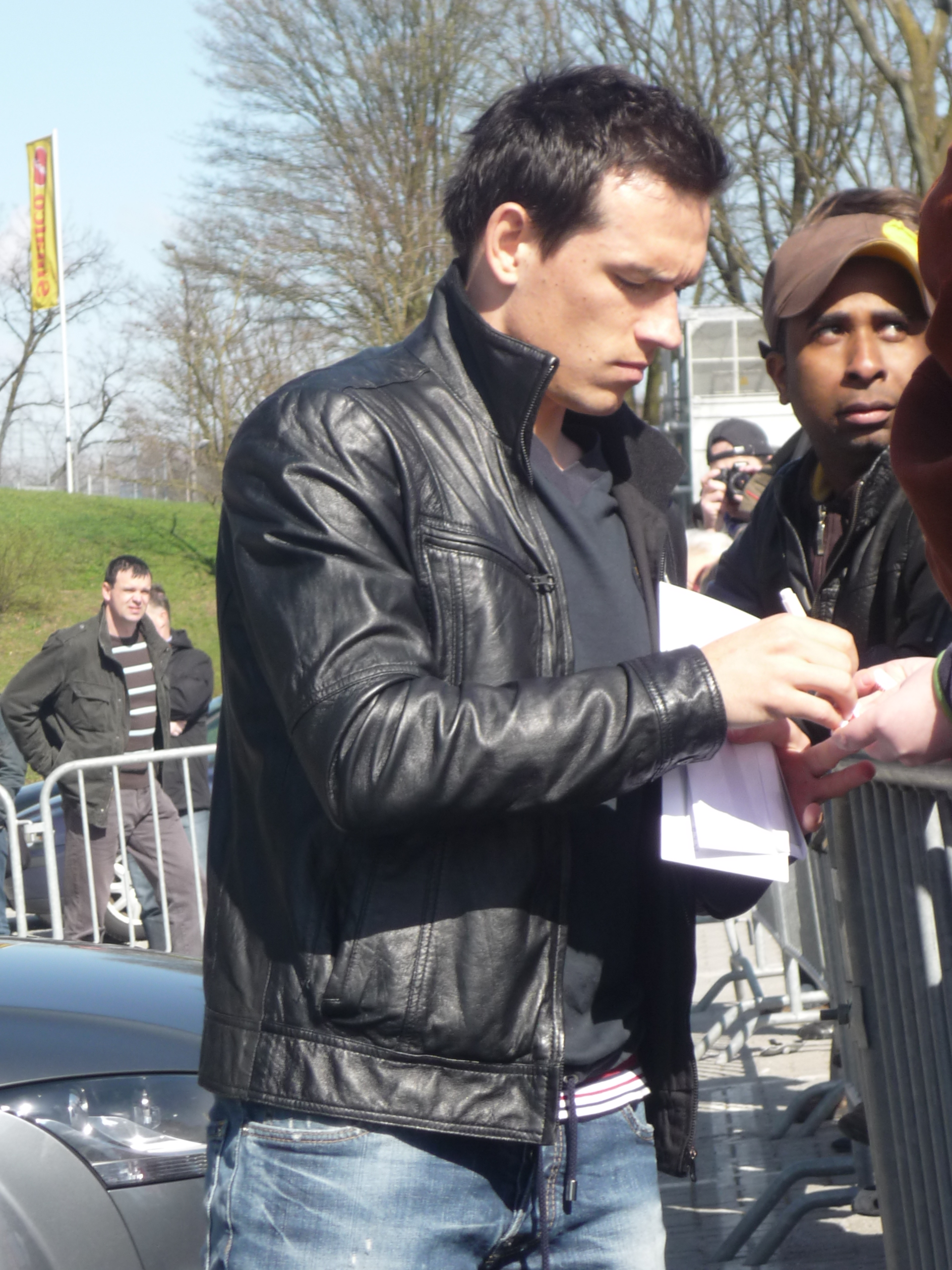 Piotr Trochowski beim Autogramme-Geben an der damaligen HSH Nordbank Arena